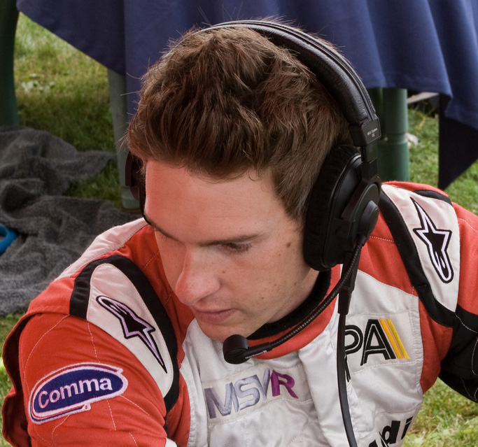 Paul Rees in 2009. Original description: 2009 GRAND EVENT